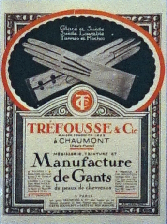 de la ganterie, mégisserie, teinturerie Tréfousse Goguenheim à Chaumont.